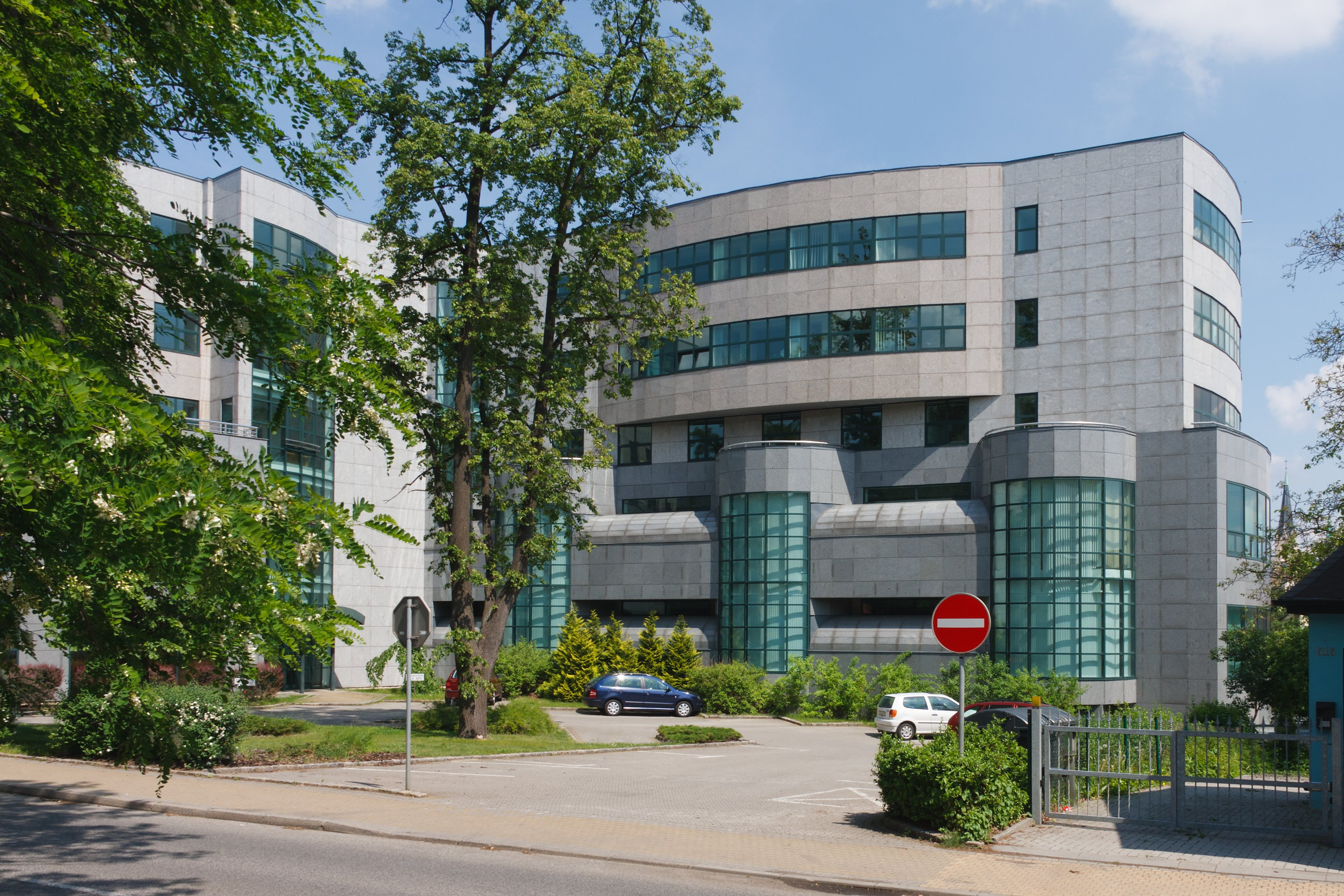 Budova Okresního soudu v Liberci, východní pohled